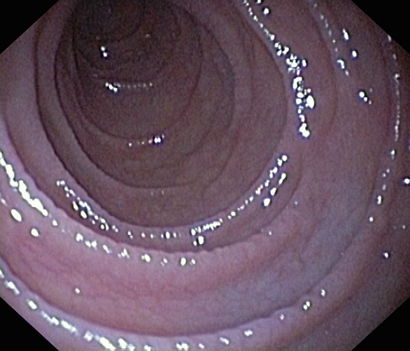 Obraz celiakie v D3 časti duodéna človeka